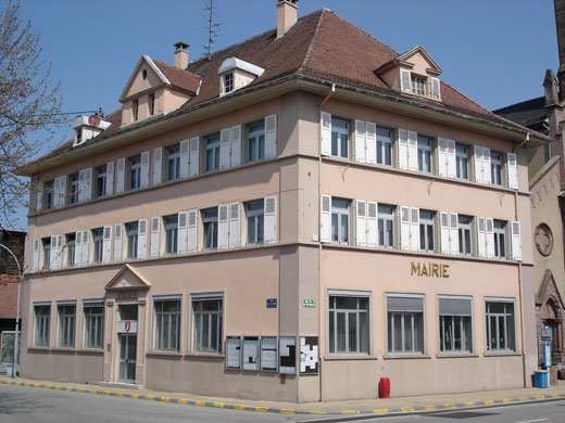 Mairie de Village-Neuf